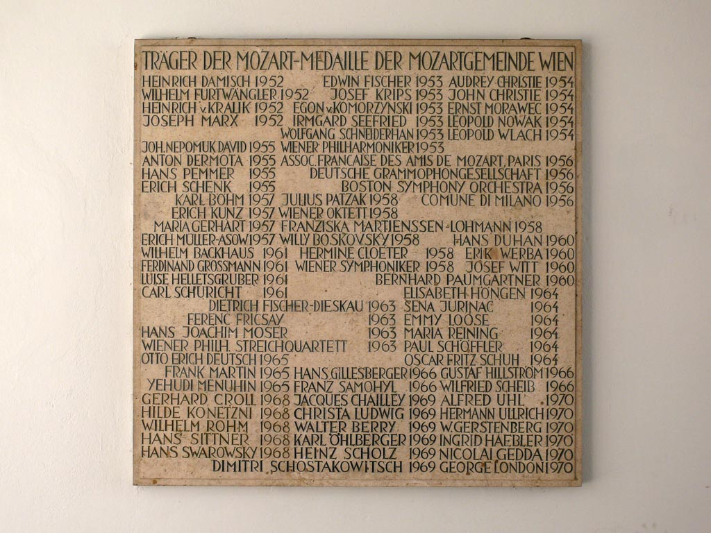 Gedenktafel der Mozartgemmeinde